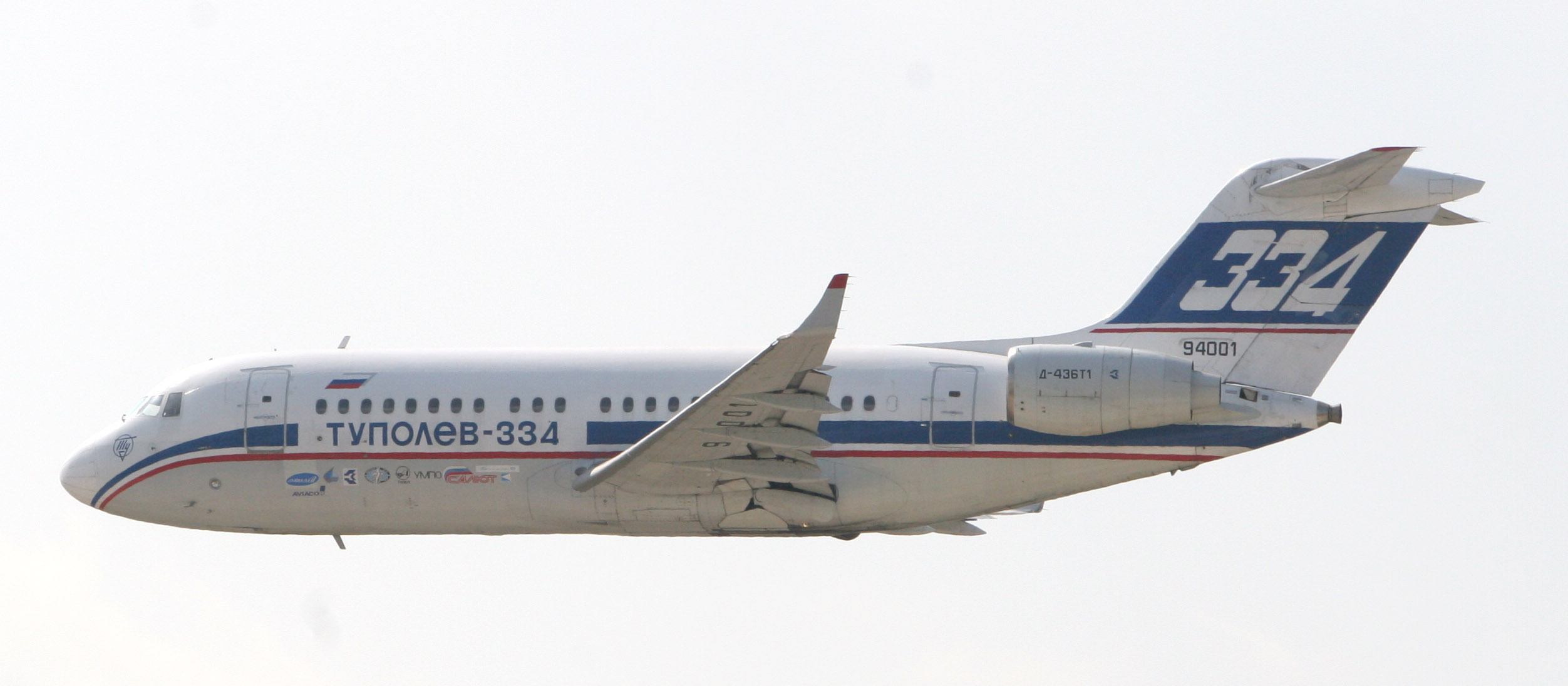 Самолёт Ту 334. Демонстрационный полёт на МАКС-2007